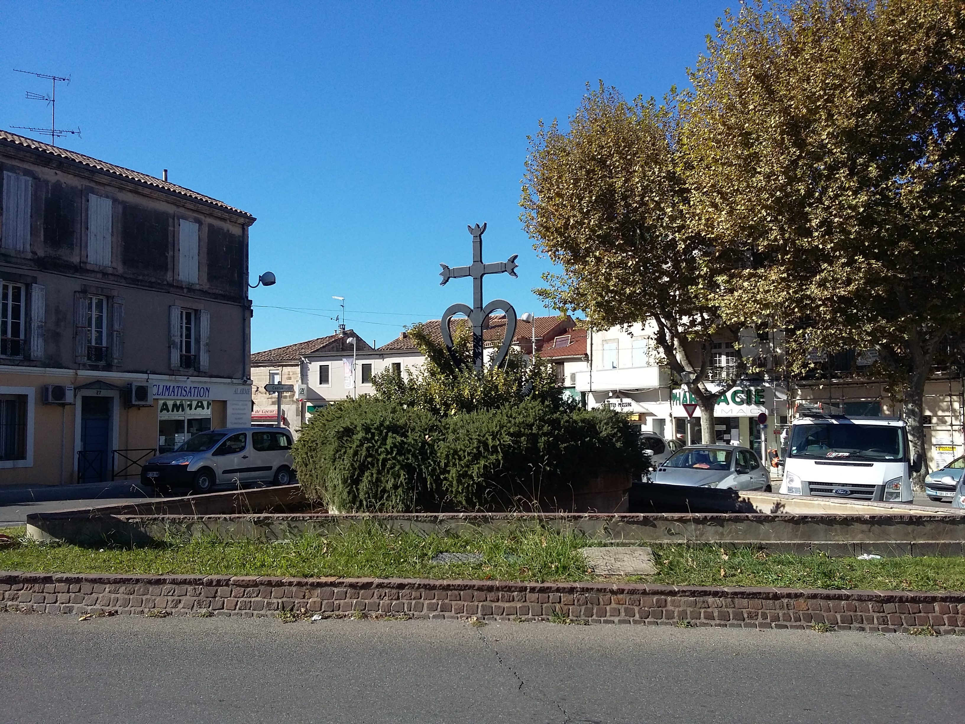 Photo de la place de la croix de Camargue à Trinquetaille, quartier d'Arles